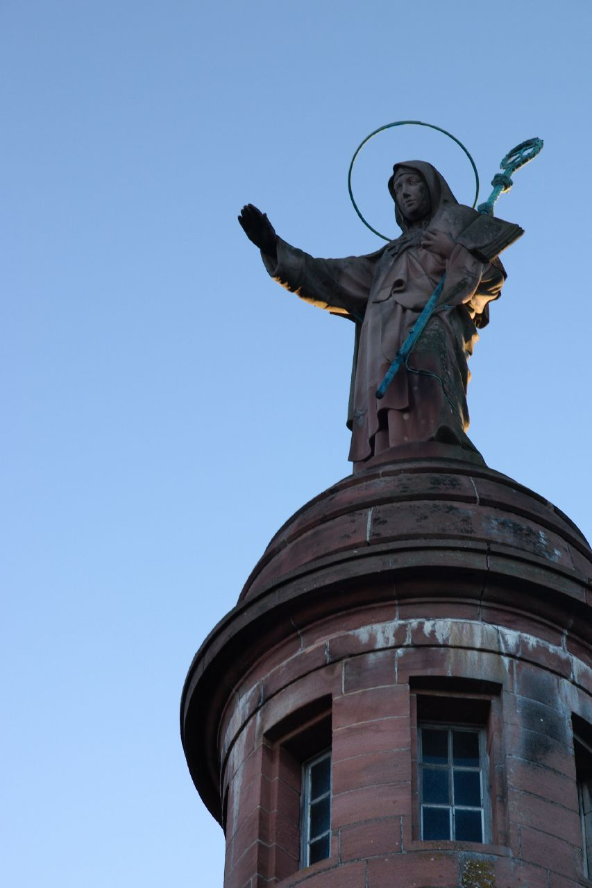 Statue de Sainte Odile au monastère du Mont Sainte-Odile, Alsace, France.